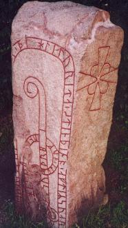 Upplands runinskrifter 932, höger sida Foto: Olof Ekström 25 juli 2003 kl.00.36 OlofE 186x331 (15227 bytes) (Upplands runinskrifter 932, höger sida)